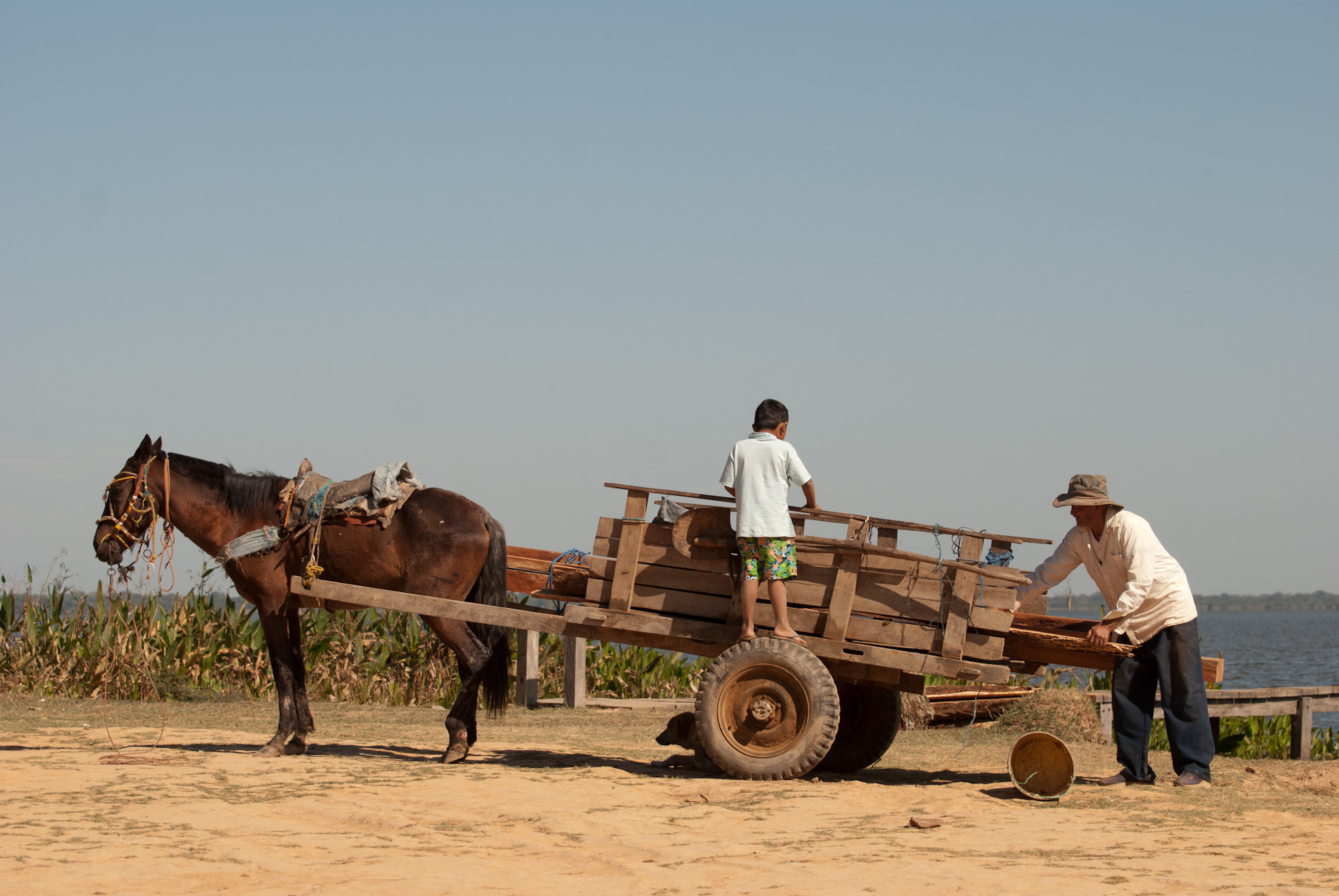 Esta foto se tomó el 5 de julio, 2011 en El Beni, Bolivia, con una Nikon D80.